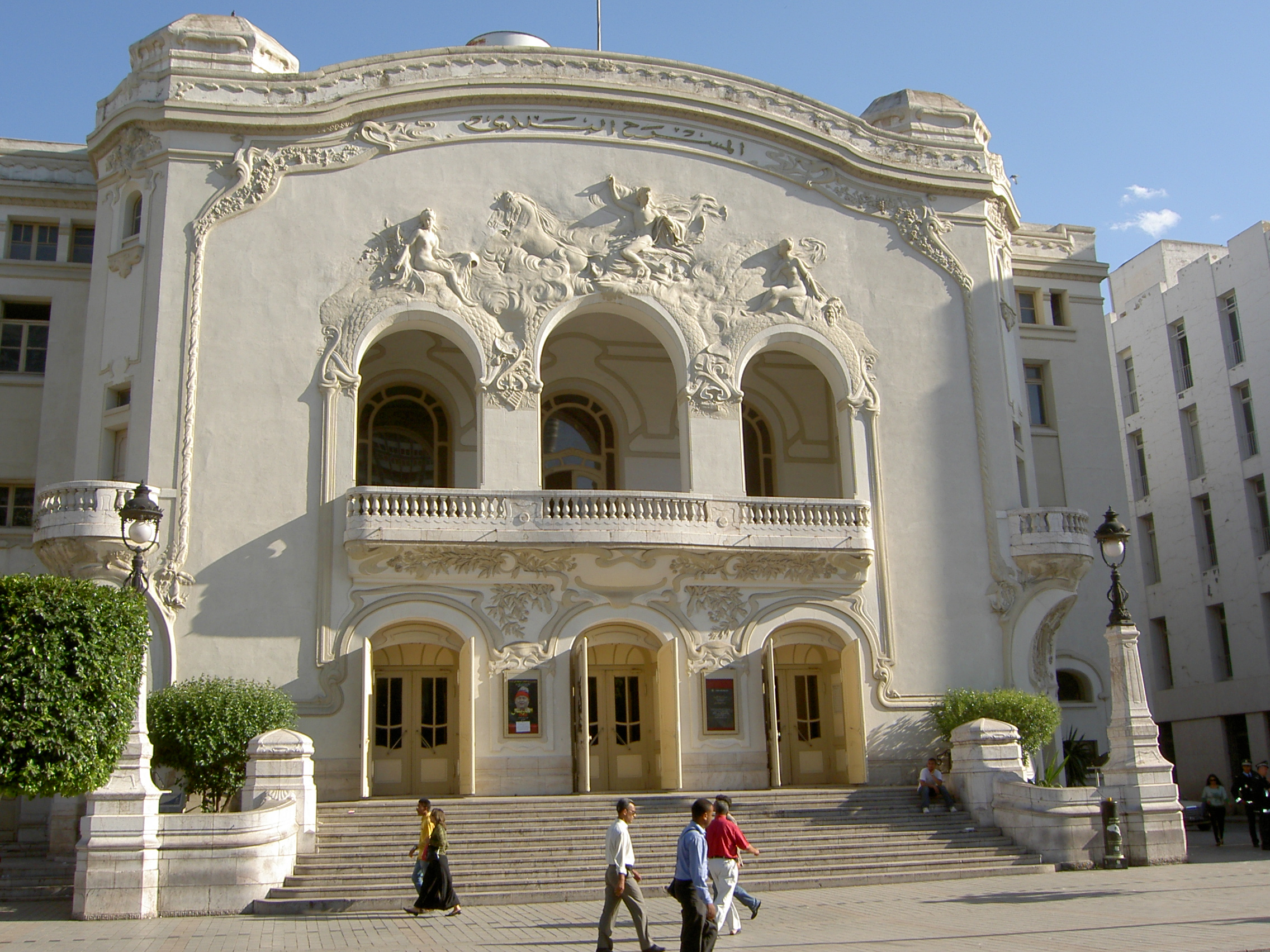 Théâtre municipal de la ville de Tunis, Tunisie